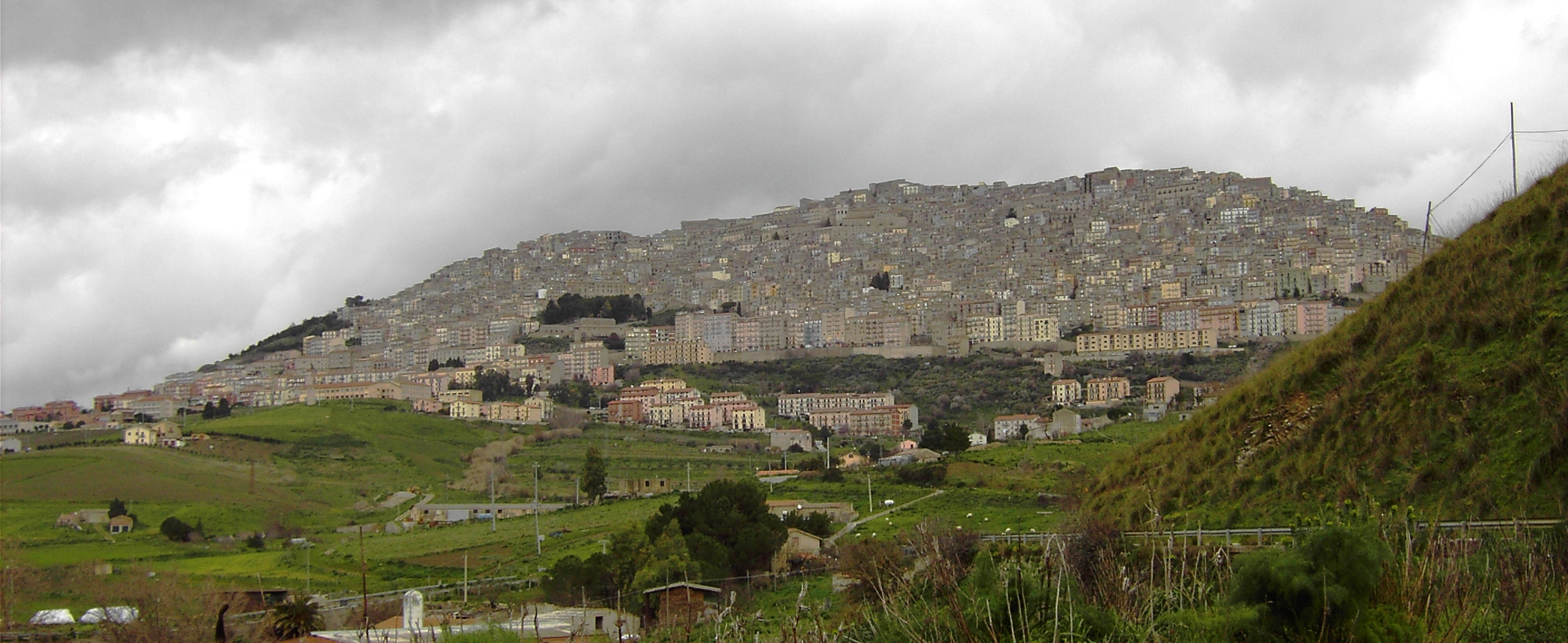 Panorama di Gangi (provincia di Palermo).